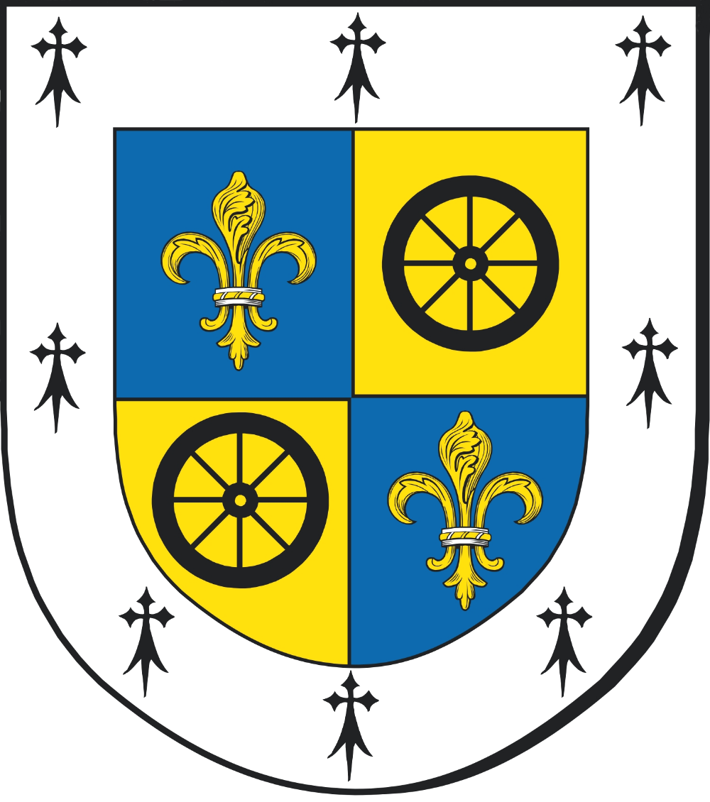 Ortega Family Shield